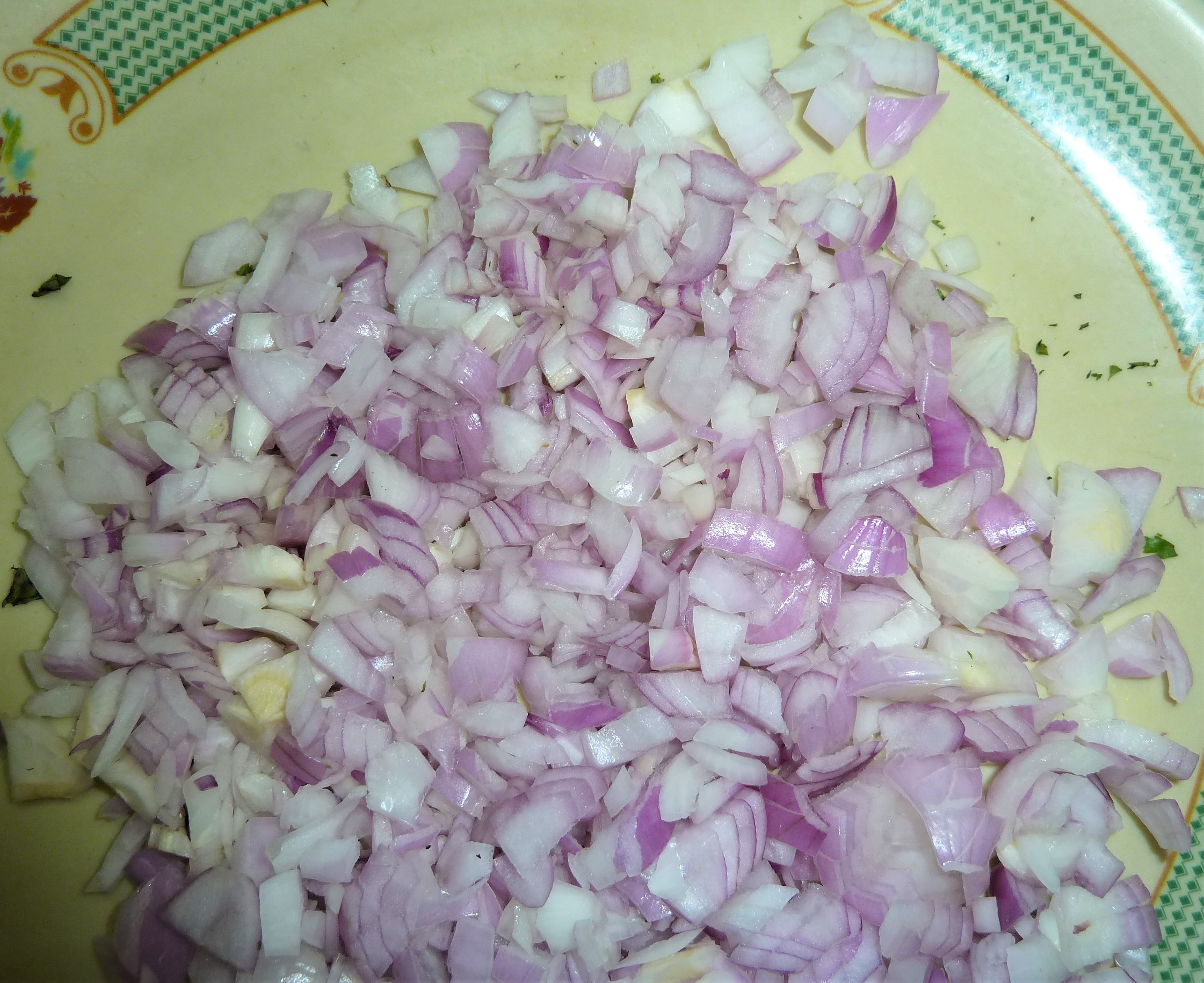 సన్నగా తరిగిన ఉల్లిపాయ ముక్కలు